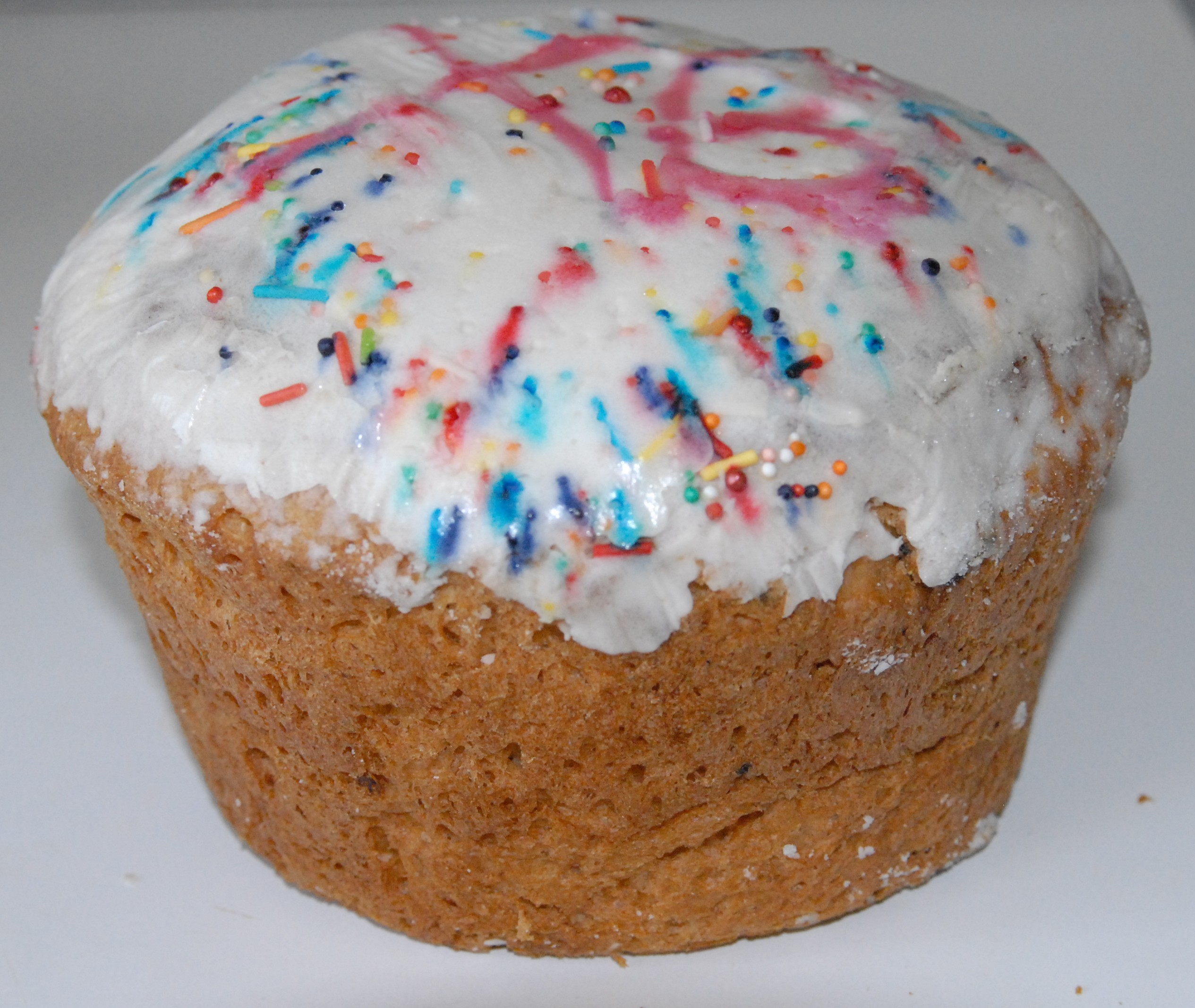 Кулич